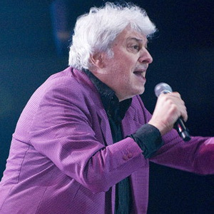 Вячеслав Добрынин на восьмом фестивале «Дискотека 80-х» в ноябре 2009 года